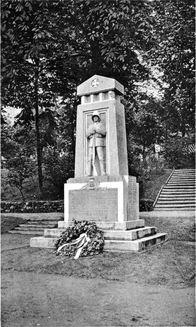 Gefallenen-Ehrenmal des (5. Ostpreußischen) Infanterie-Regiments Nr. 41 „von Boyen“ in Tilsit (Ostpreußen), dem heutigen Sowetsk